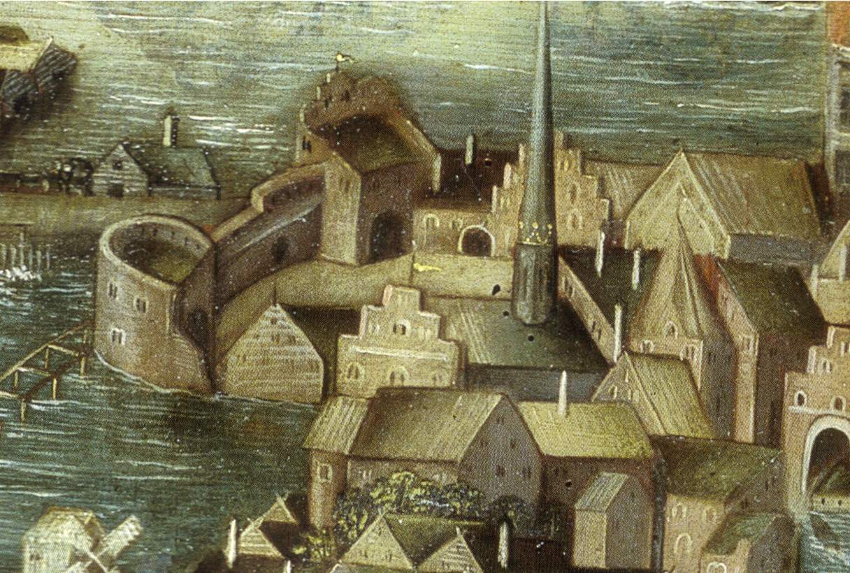 Detail from Vädersolstavlan showing Helgeandsholmen.